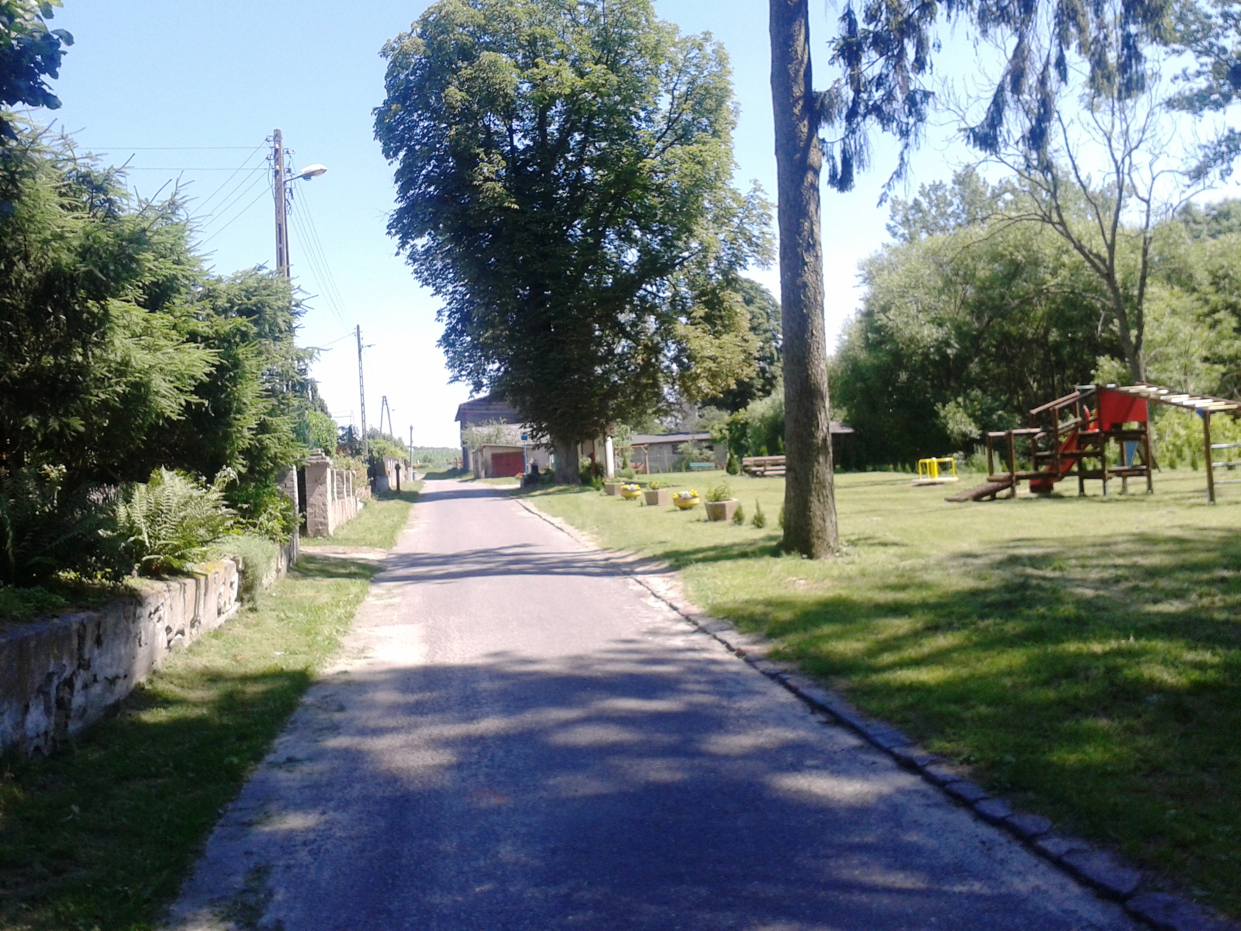 Niegrzebia w gminie Łobez